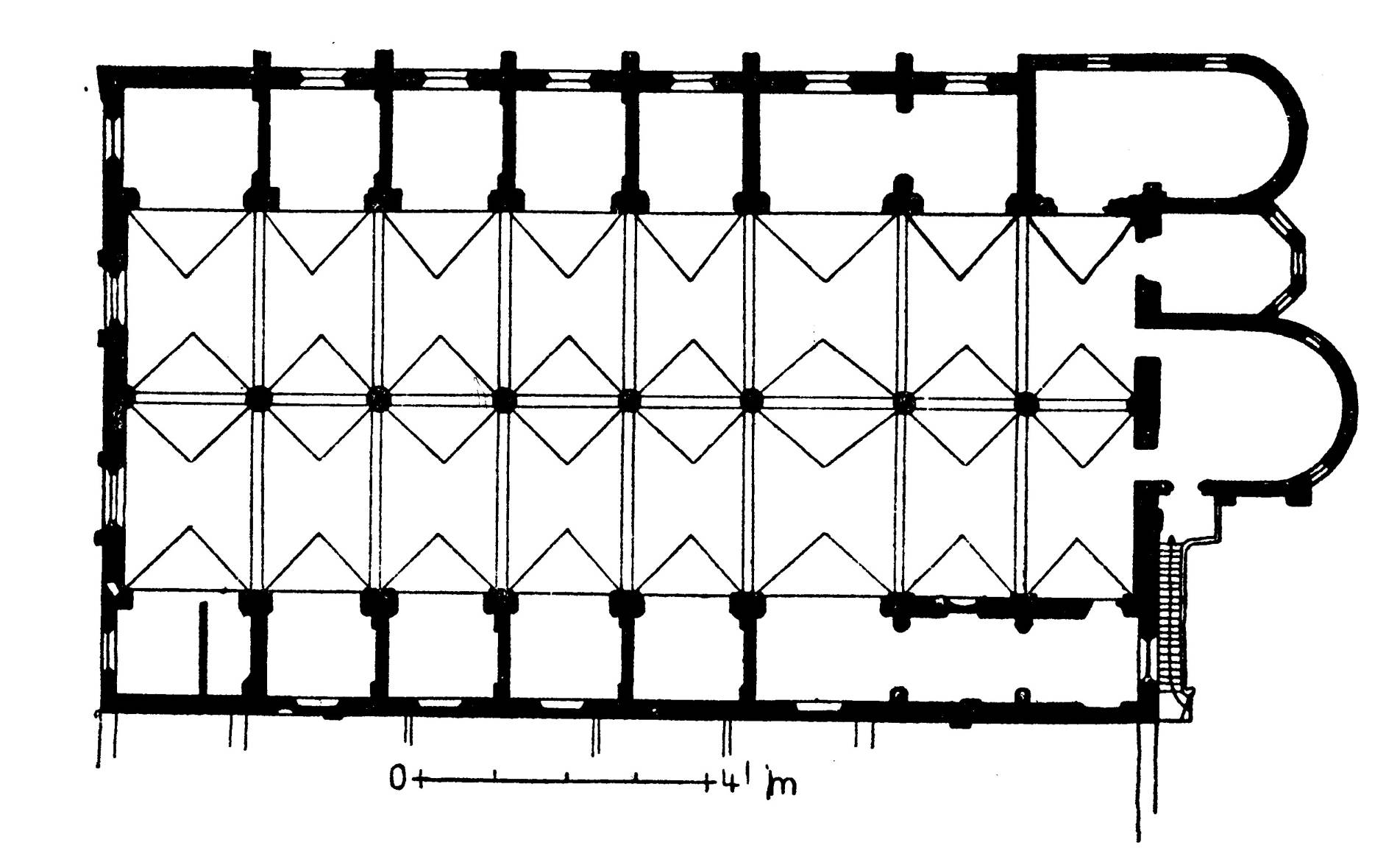 Grundriss Augsburger Dominikanerkirche St. Katharina